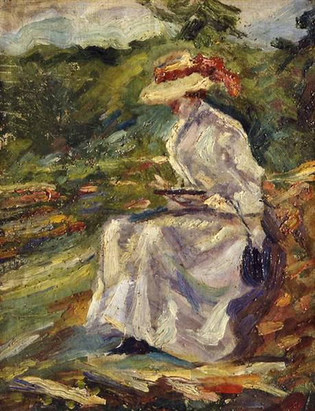 Oleo sobre tela